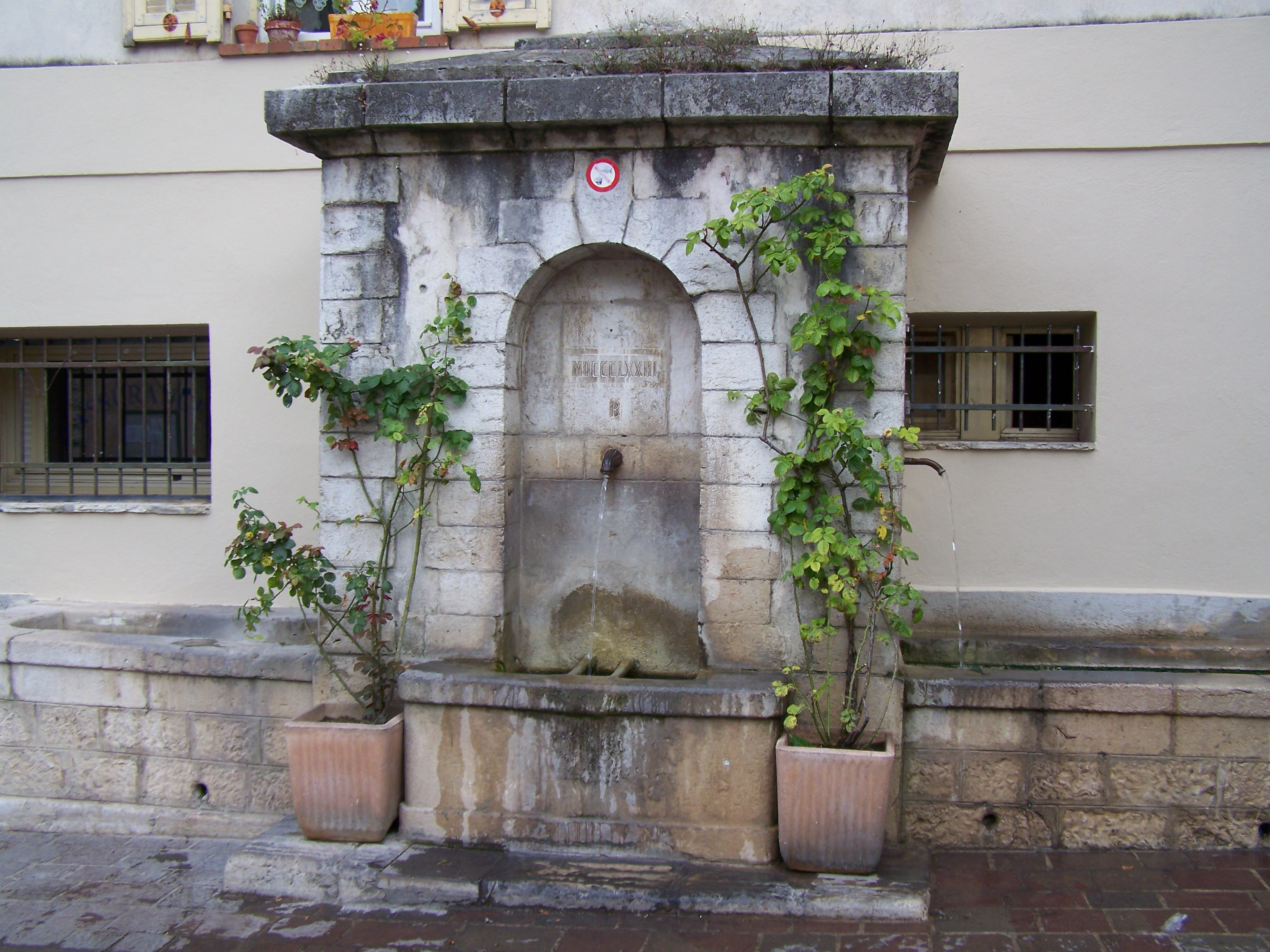 Fontaine publique (1873) sur la place de la République du village de Levens (Alpes-Maritimes, France)